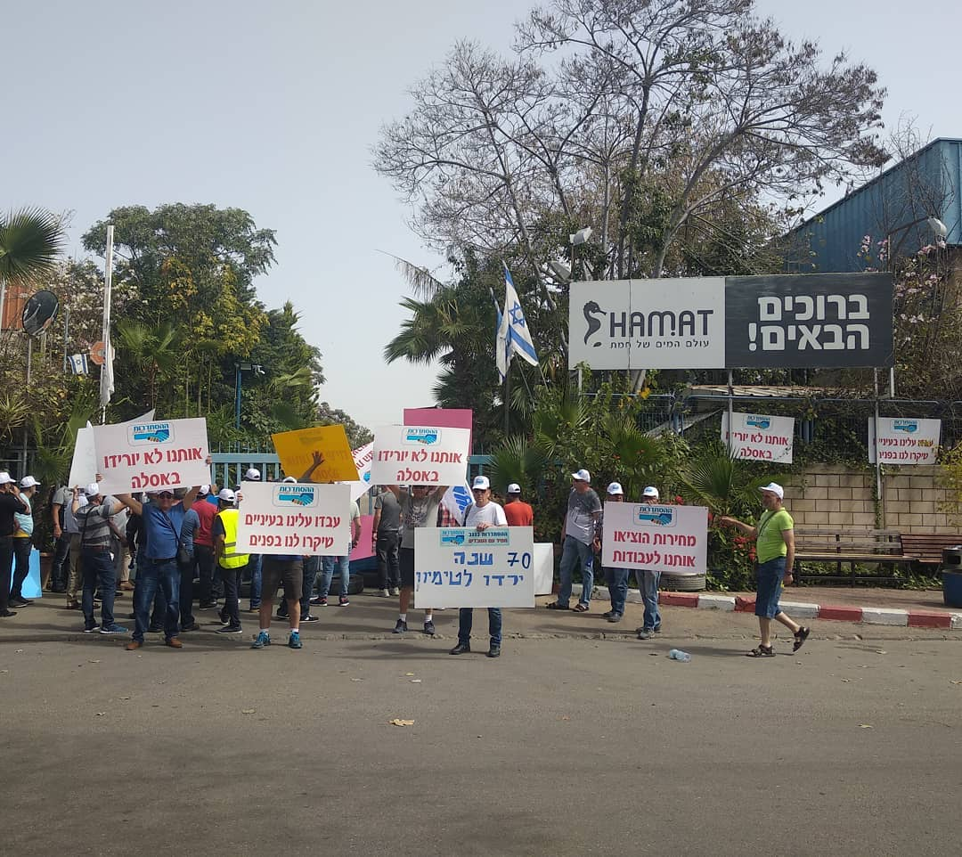 עובדי חרסה מפגינים מול משרדי חברת האם חמת באשדוד